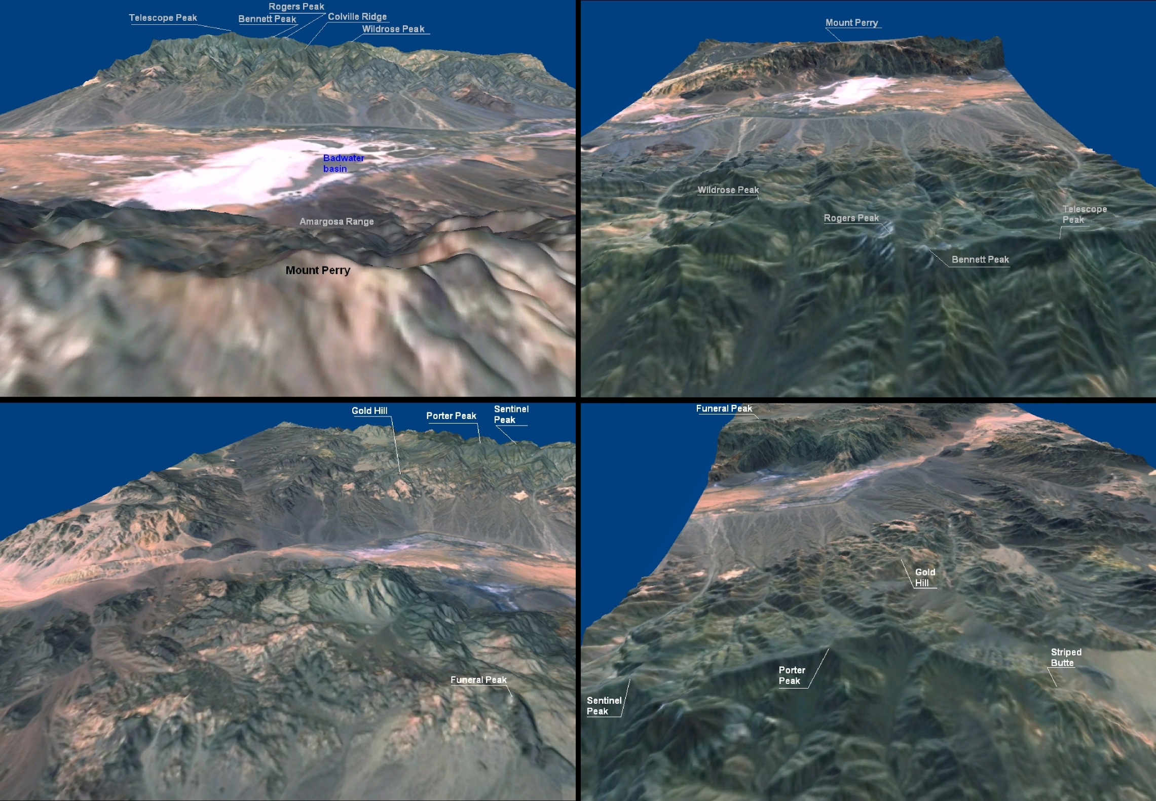 Reprezentare 3D din Death Valley (Valea Morţii), imagine realizata cu date SRTM furnizate liber de NASA.